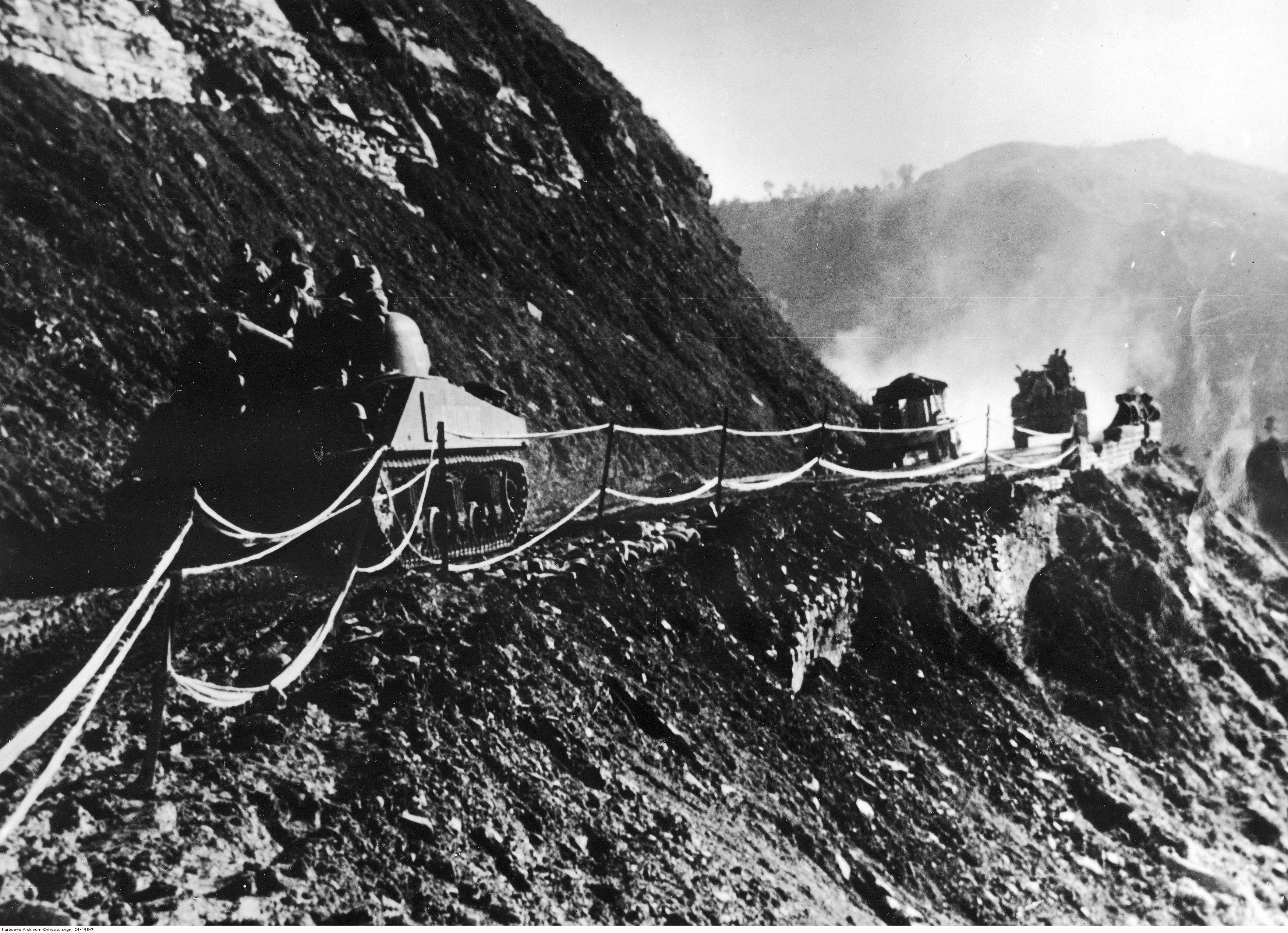 Przemarsz Samodzielnej 2 Brygady Pancernej podczas walk 2 Korpusu Polskiego w Apeninie Emiliańskim. Czołgi M4 Sherman 1 Pułku Ułanów Krechowieckich w trakcie przemarszu przez Apeniny. Archiwum Fotograficzne Tadeusza Szumańskiego. Sygnatura: 24-498-7